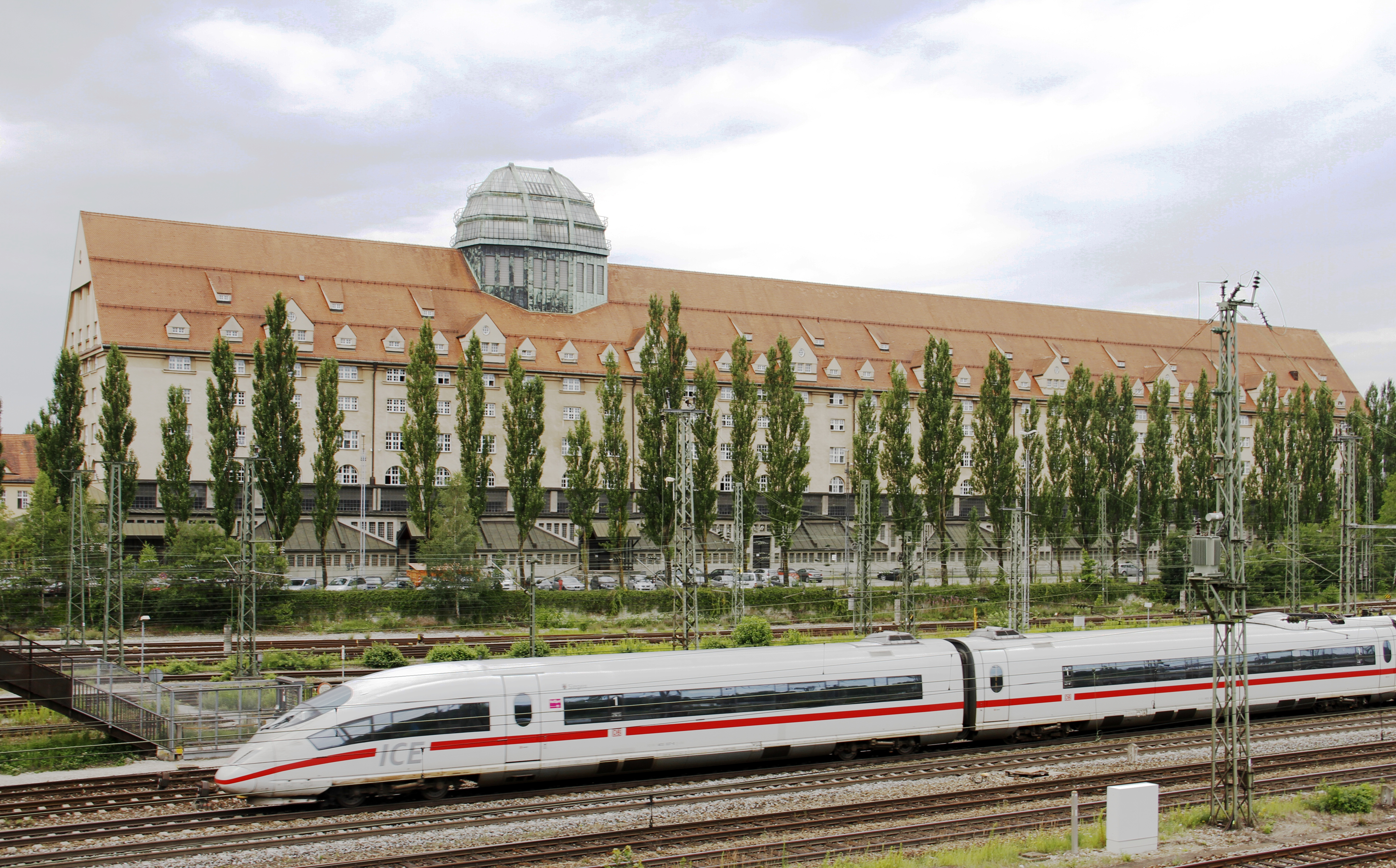 Hauptzollamt München, Lagerhalle mit Glaskuppel von der Bahnseite